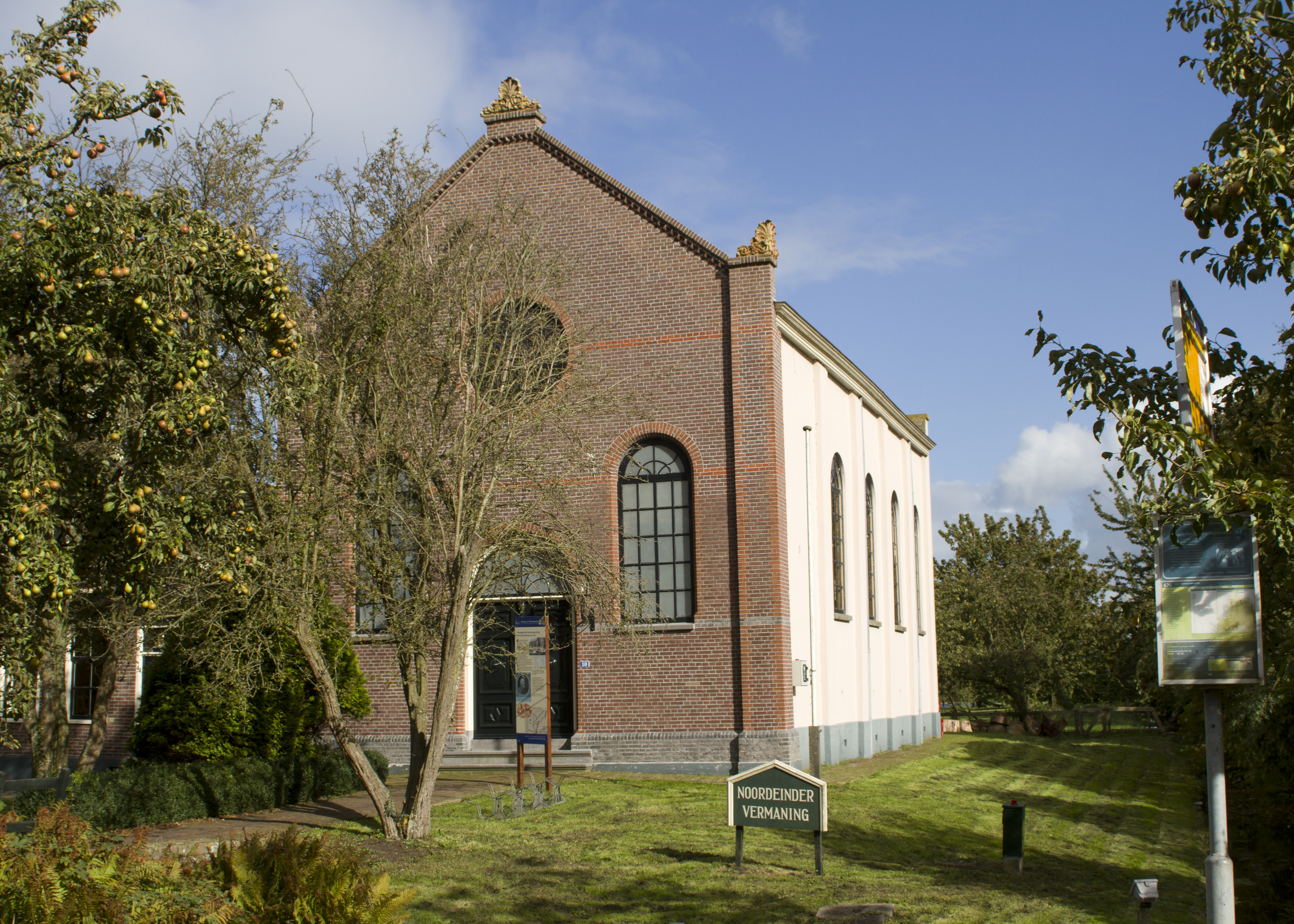 Noordeinder Vermaning